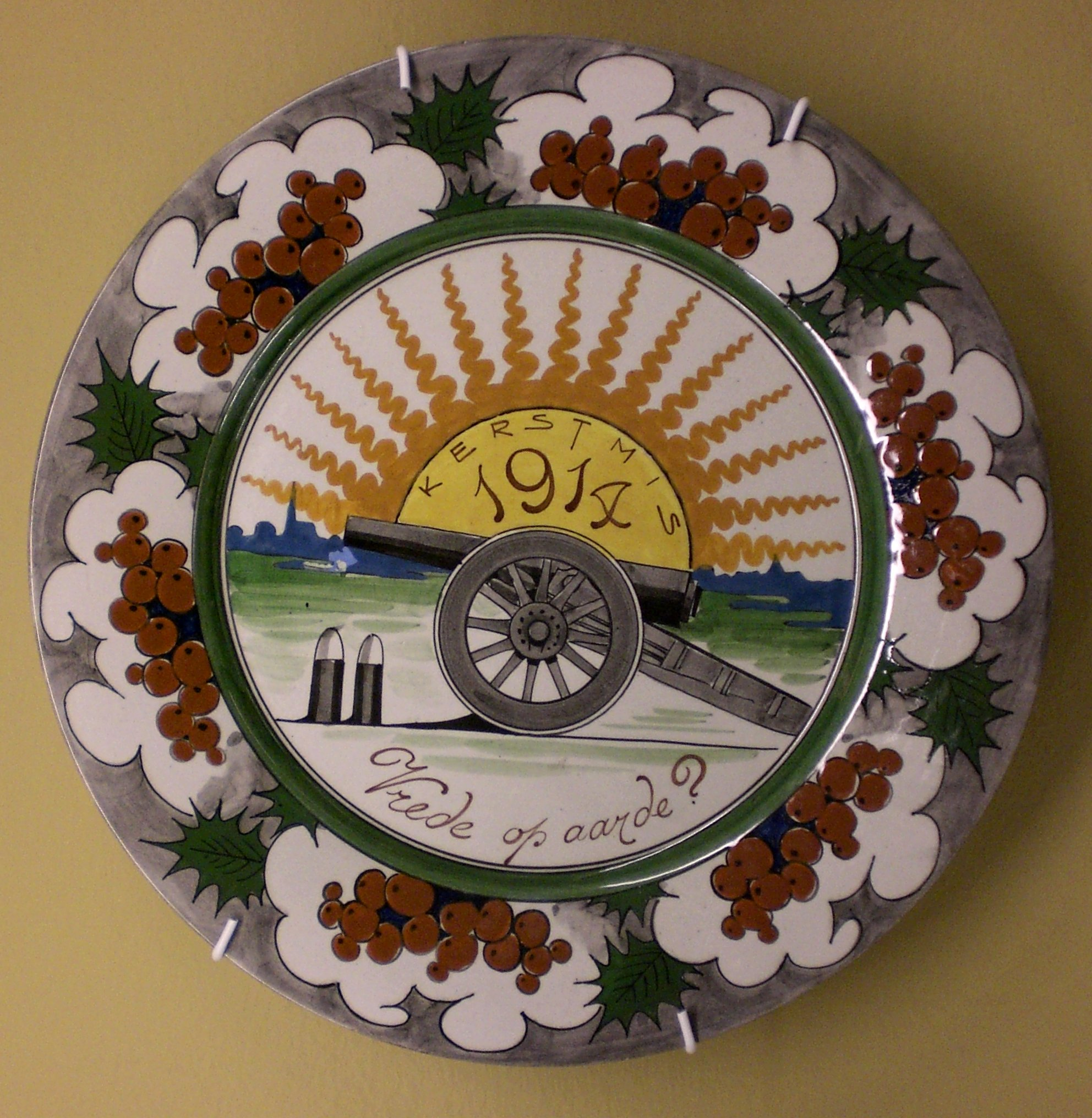 Plate Christmas 1914, Potterij Rembrandt, Museum Het Valkhof, Nijmegen